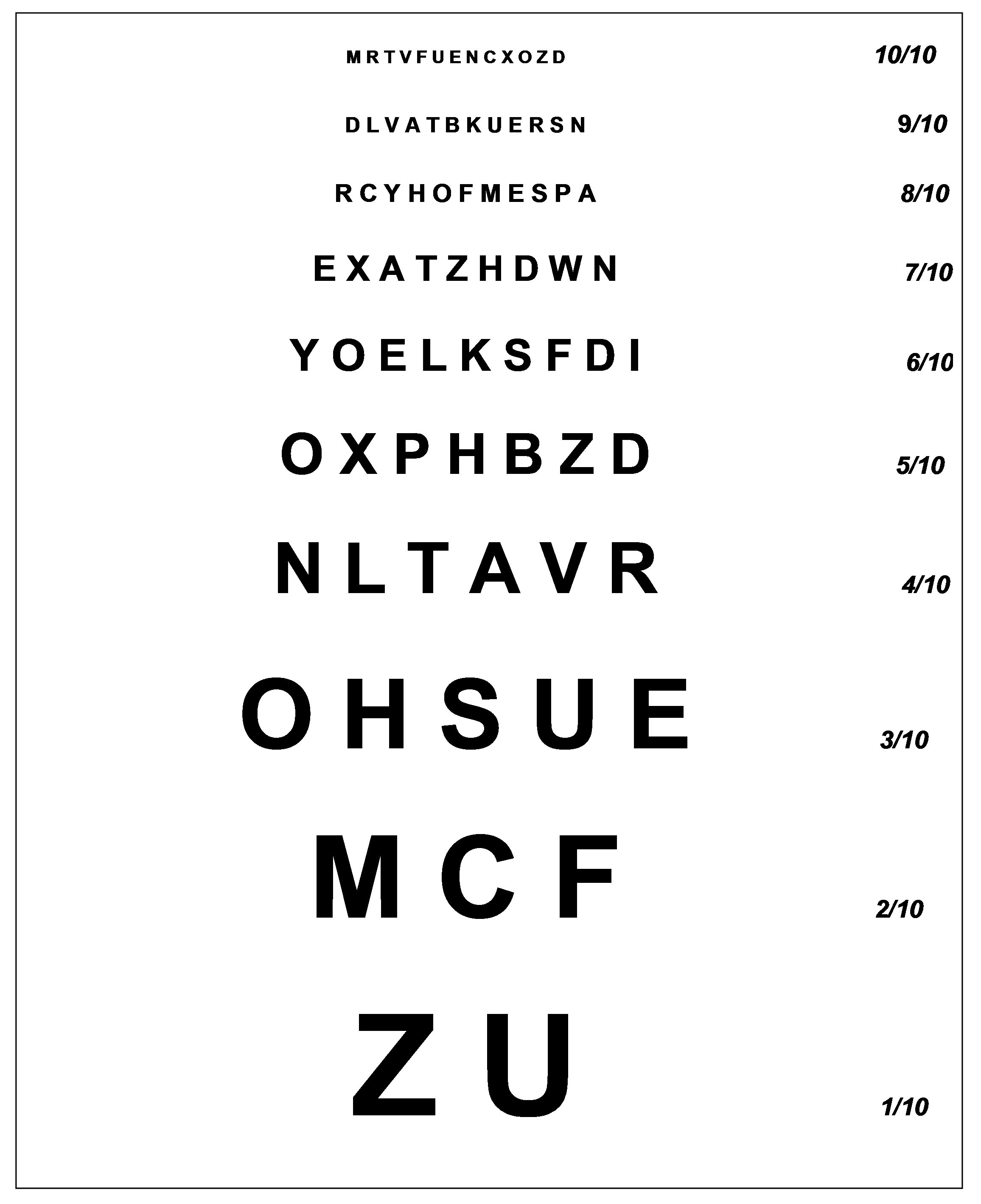 représentation de l'échelle Monoyer (5m)